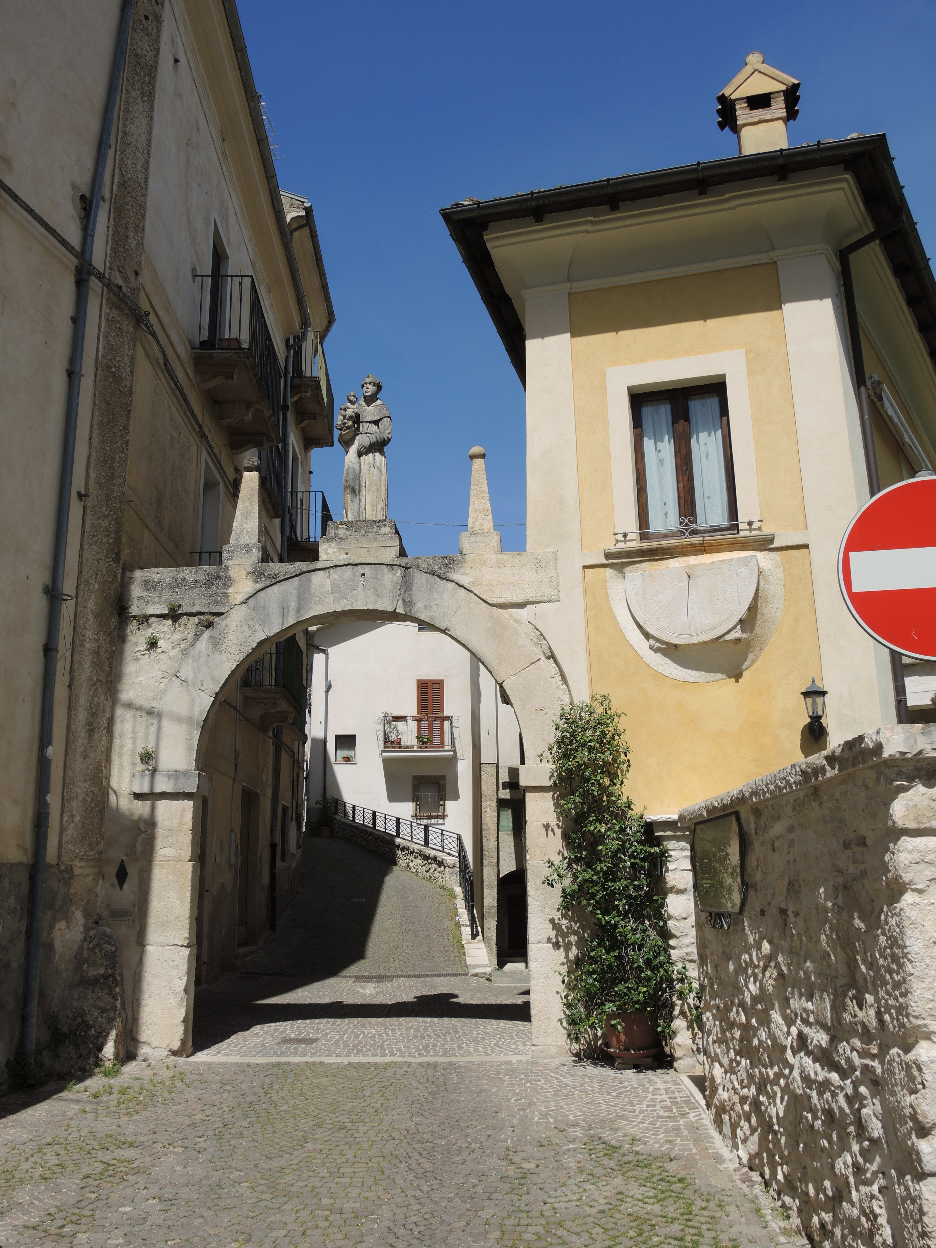 Pettorano sul Gizio